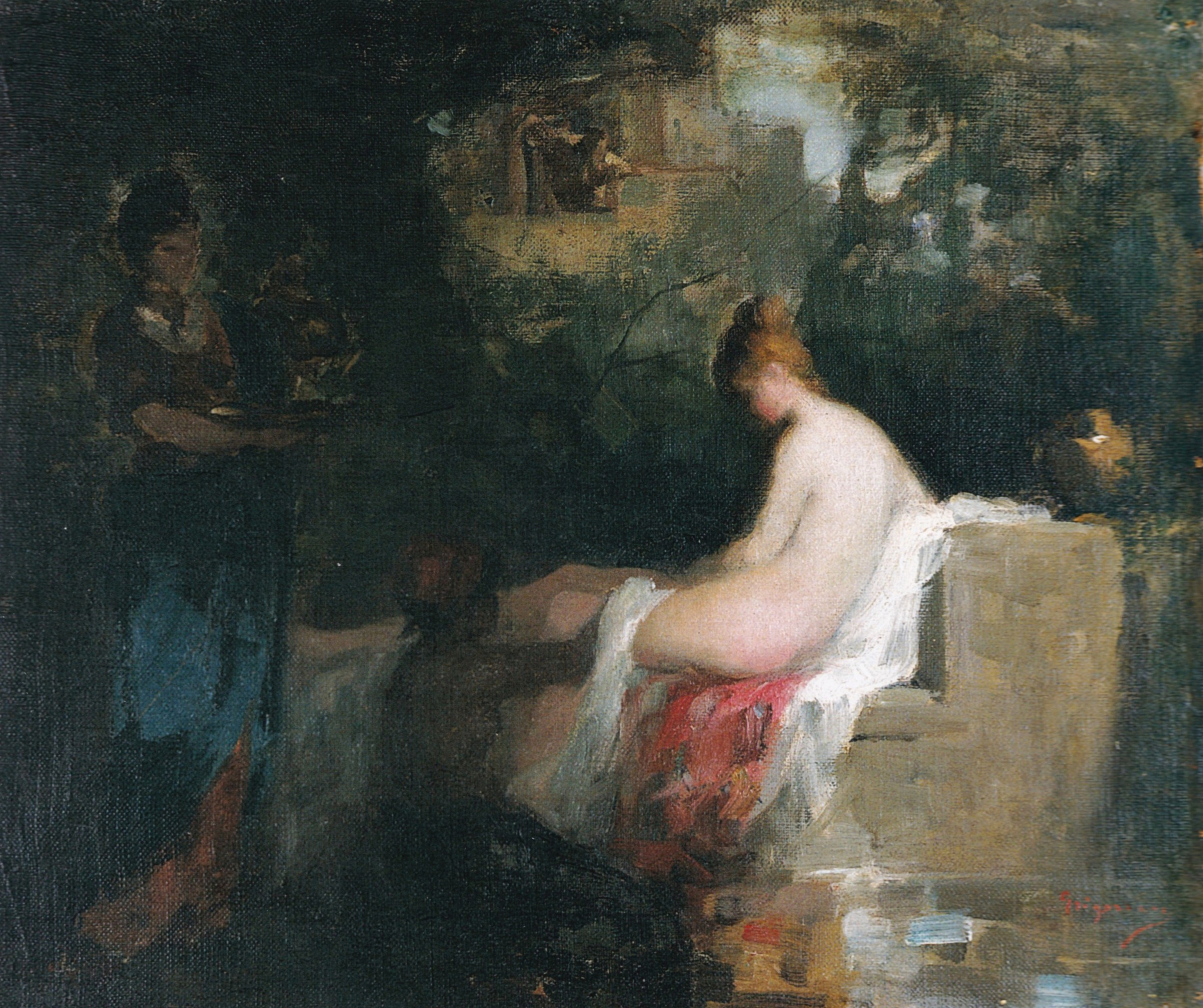 După baie, ulei/pânză, 33x38,5cm - Muzeul Național de Artă al României